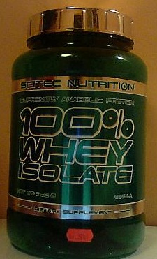 100% whey isolate